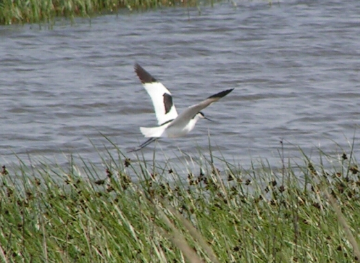 Recurvirostra avosetta